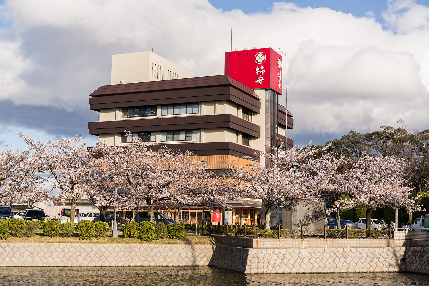 柿安本店本社